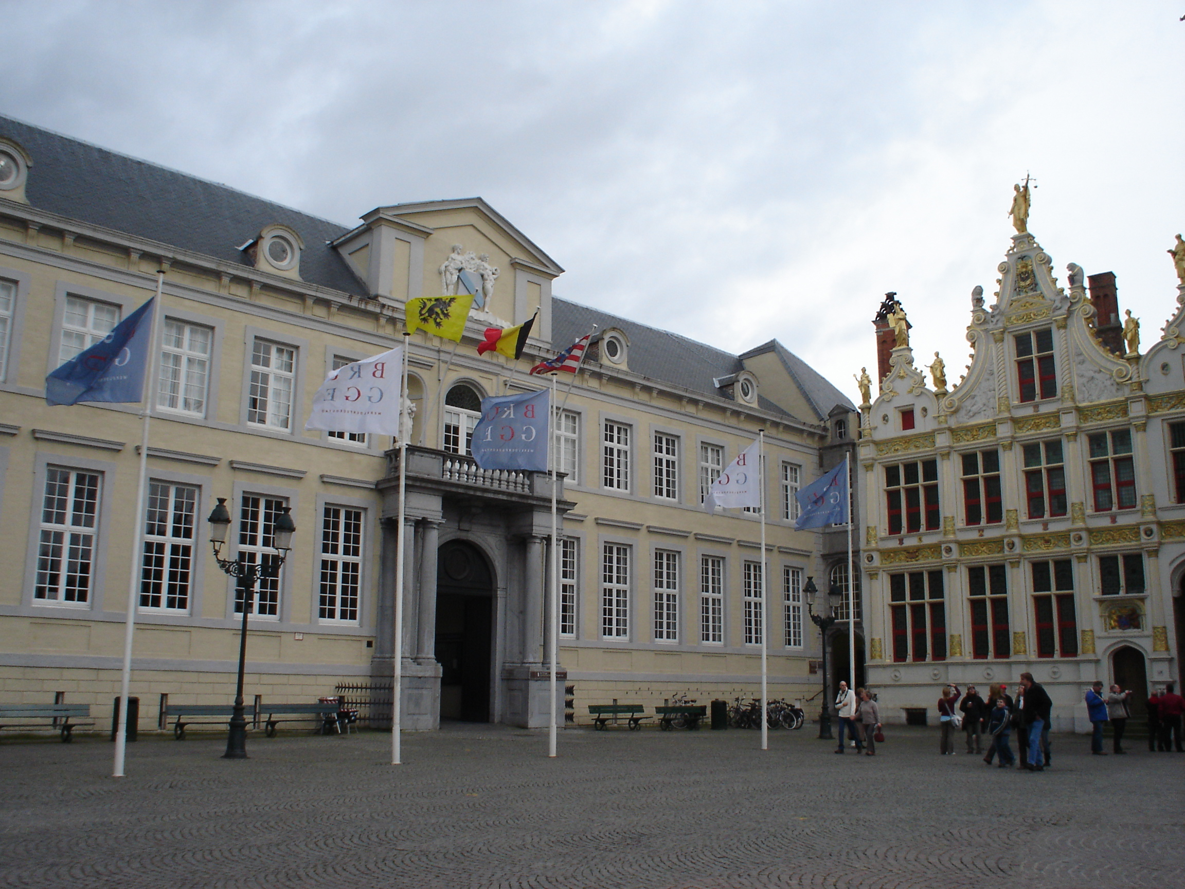 Burg